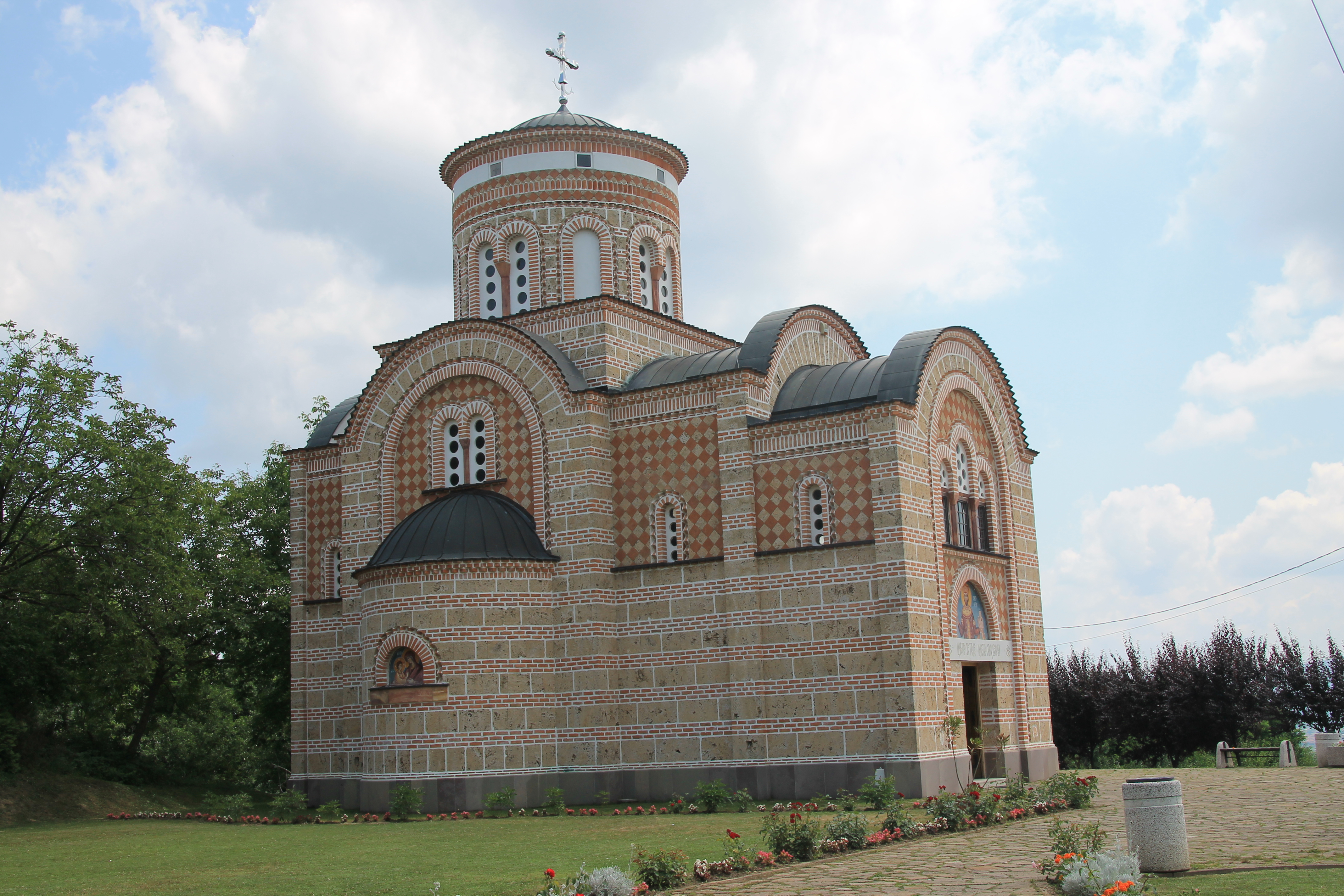 Crkva Sv. cara Lazara (Ljubić)